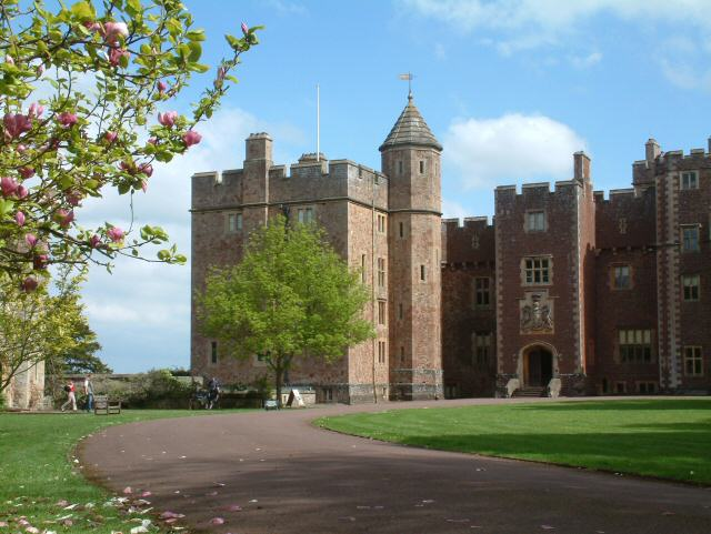 Dunster Castle